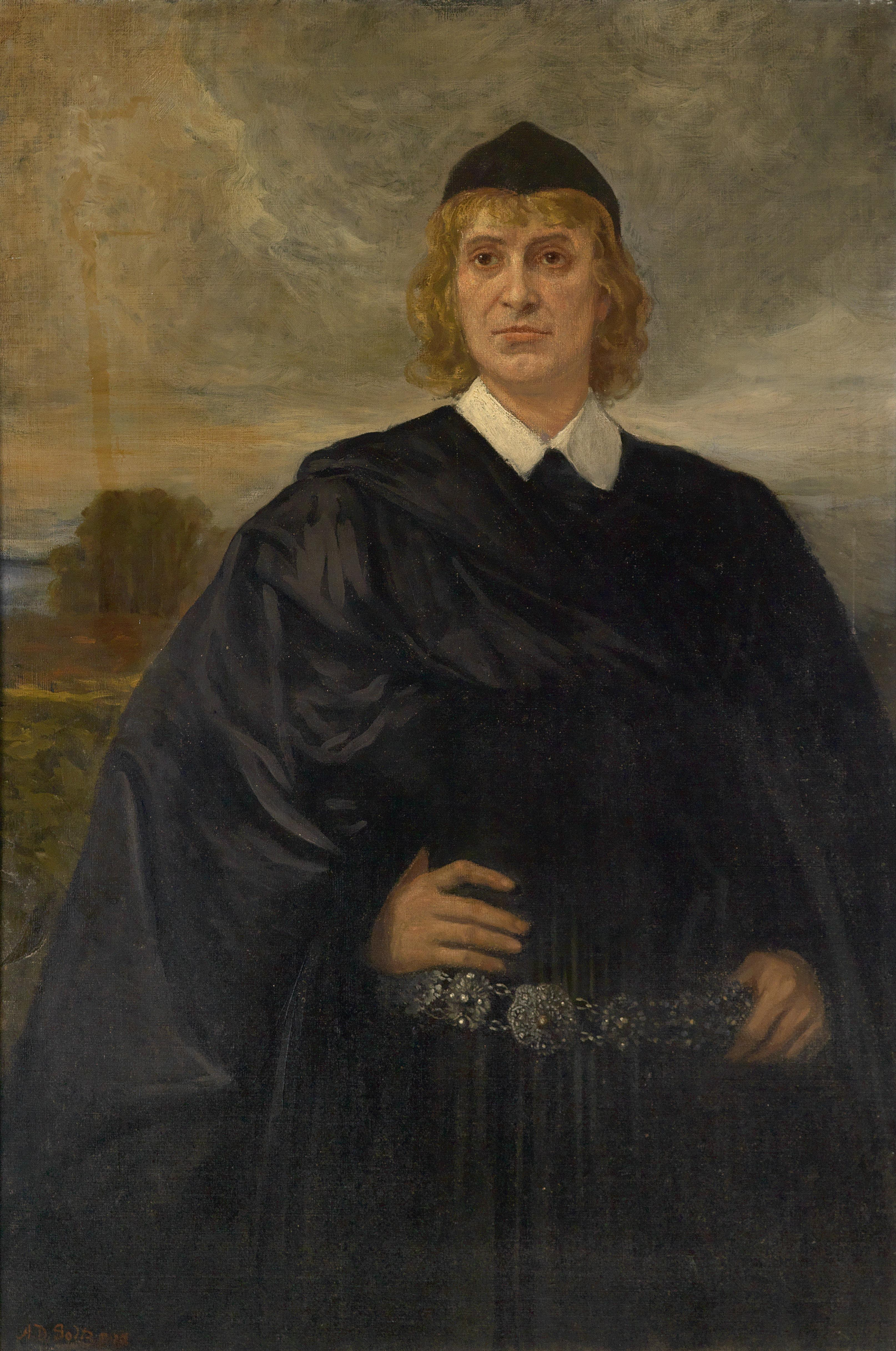 Josef Kainz als Torquato Tasso, 1910, Öl auf Leinwand, 124 x 84 cm